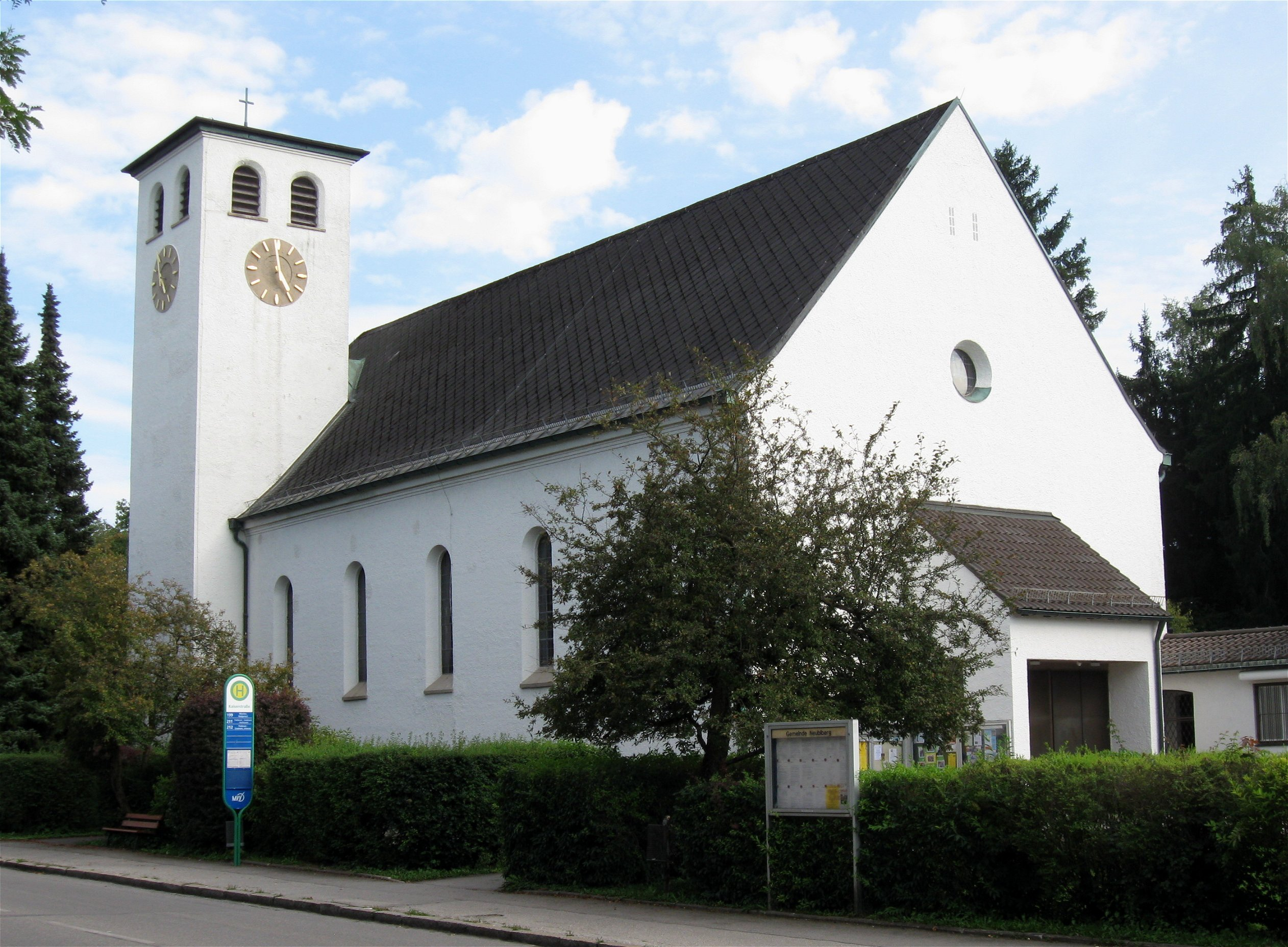 Hauptstraße 36; Katholische Pfarrkirche Maria Rosenkranzkönigin, im Jahr 1928 in sachlich-modernen Formen erbaut, im Jahr 1969 erweitert. D-1-84-146-1